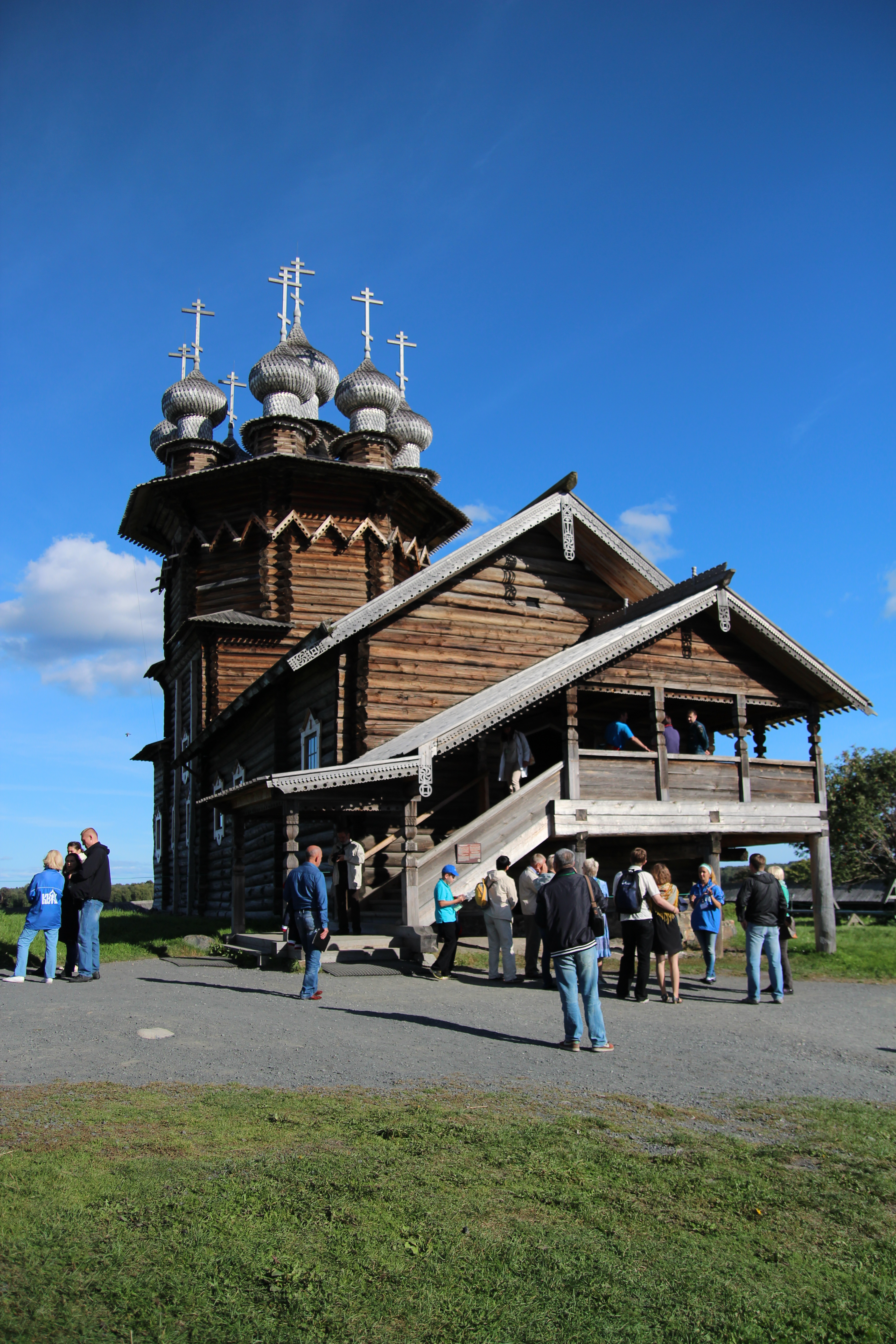 Покровская церковь (Кижи)